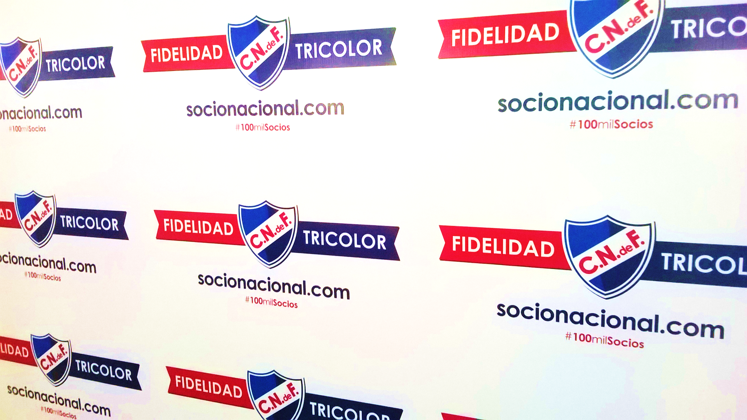 Afiche de Nacional